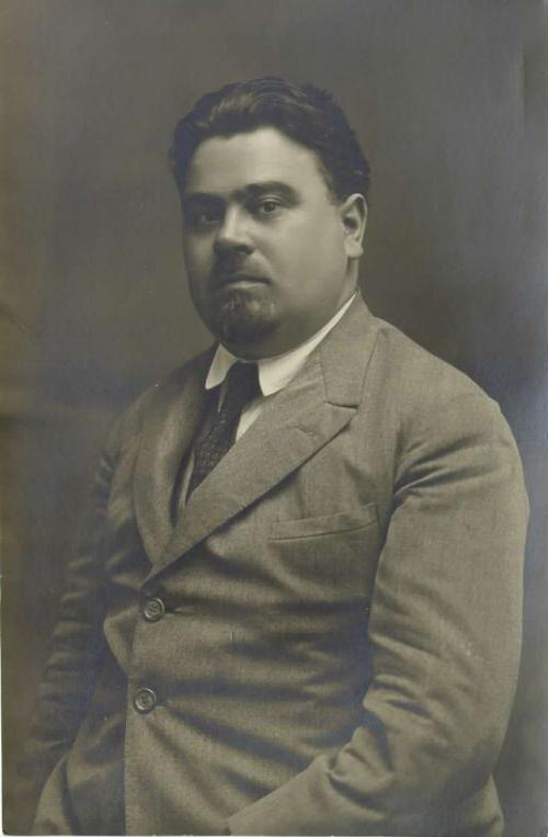 Josip Bitežnik (1891-1960), Slovene jurist and politician.